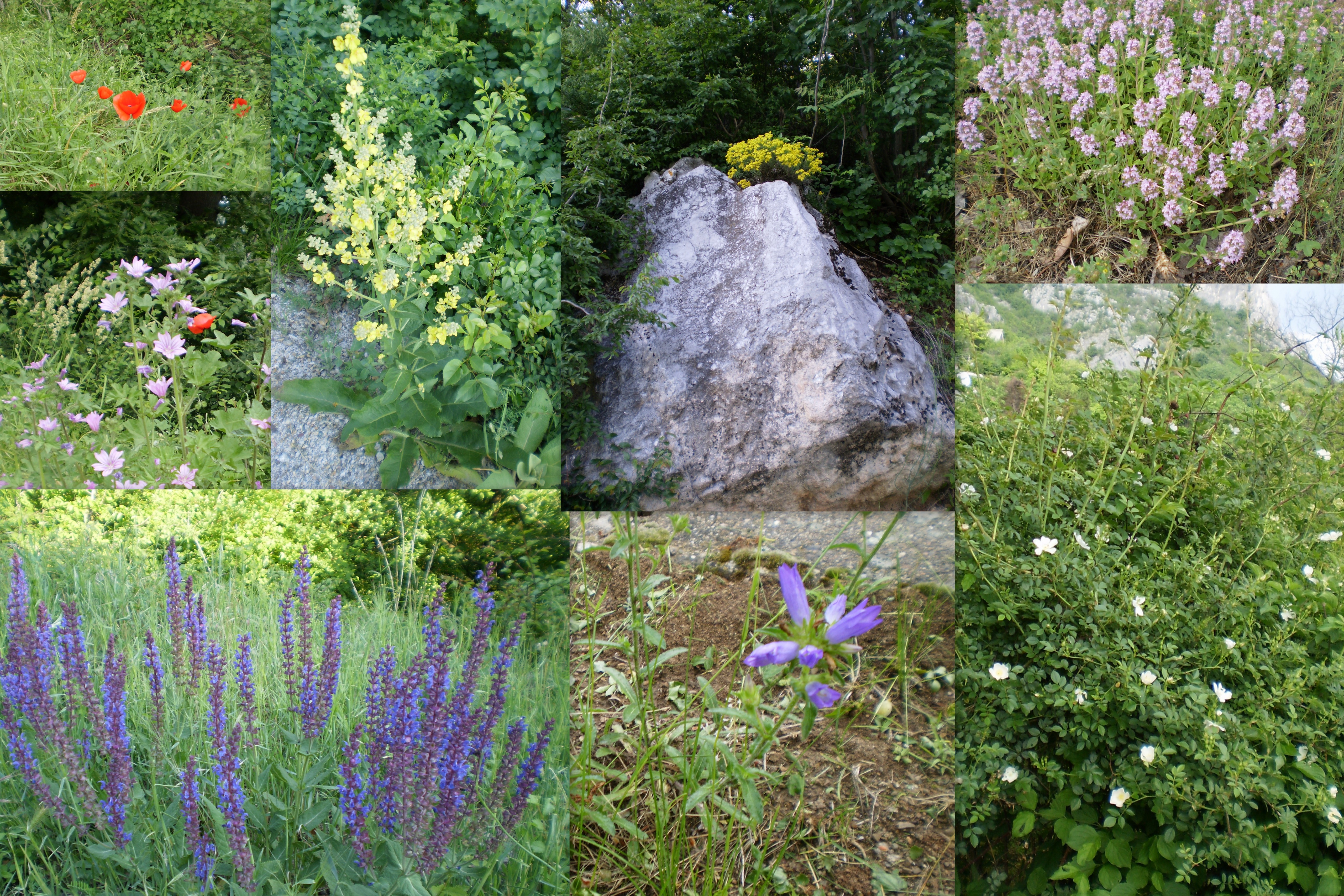 Deo florističkog bogatstva Sićevačke klisure. Kolaž slika iz kolekcije Milorada Dimića MD. Niš, 26. 5. 2012.